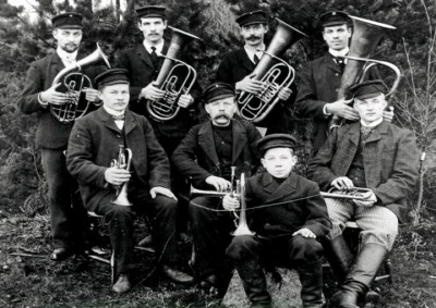 Lappböle Hornkapell 1905